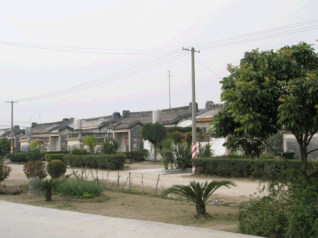 潮汕传统民居下山虎建筑群